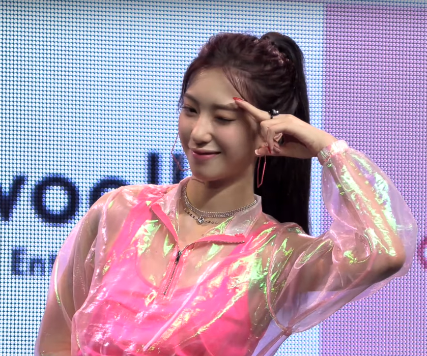 SuYun Phototime in 2019 Rocket Punch 1st Mini Album [Pink Punch] Showcase